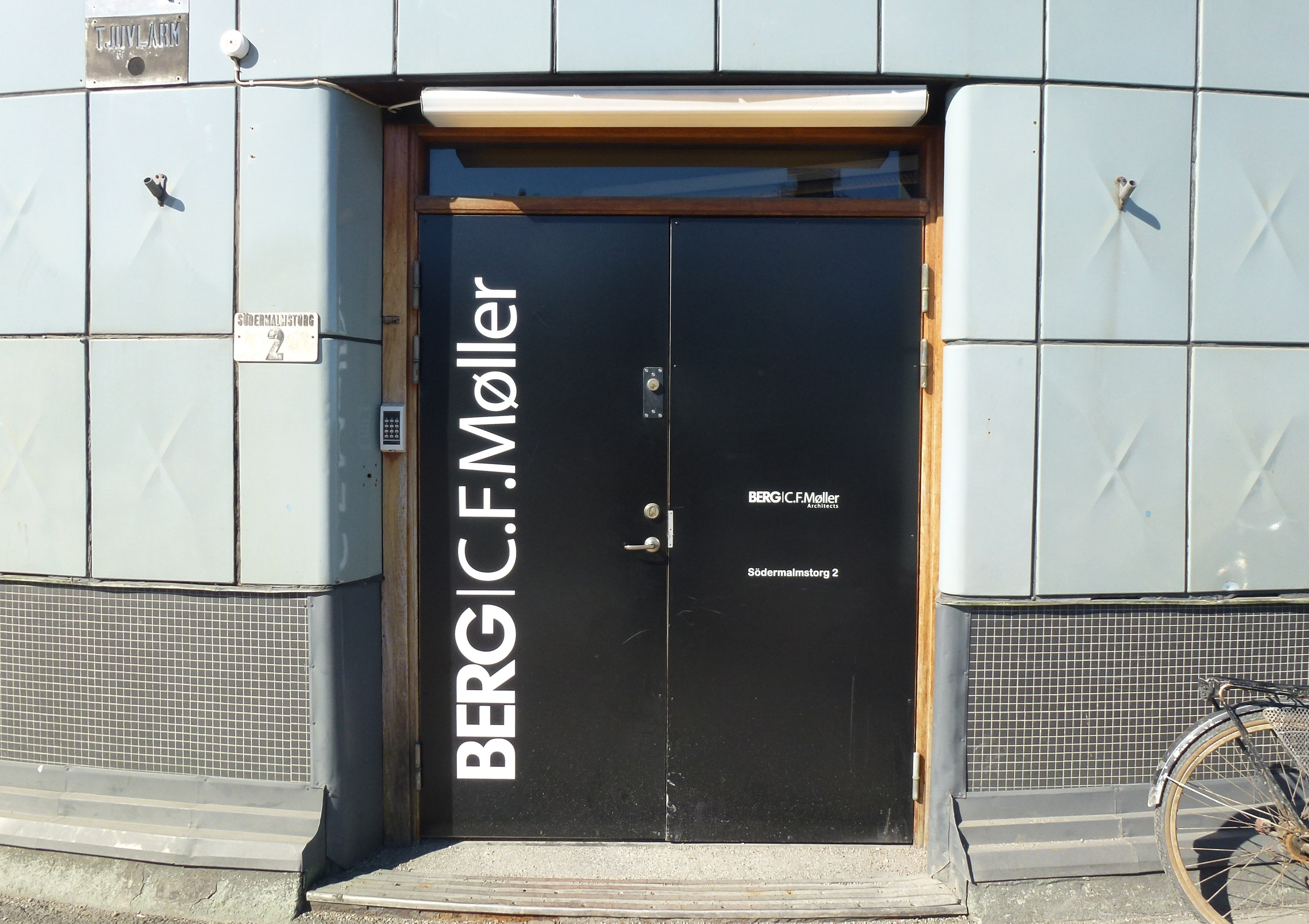 Berg / C.F. Moller Architects AB, Slussen Stockholm